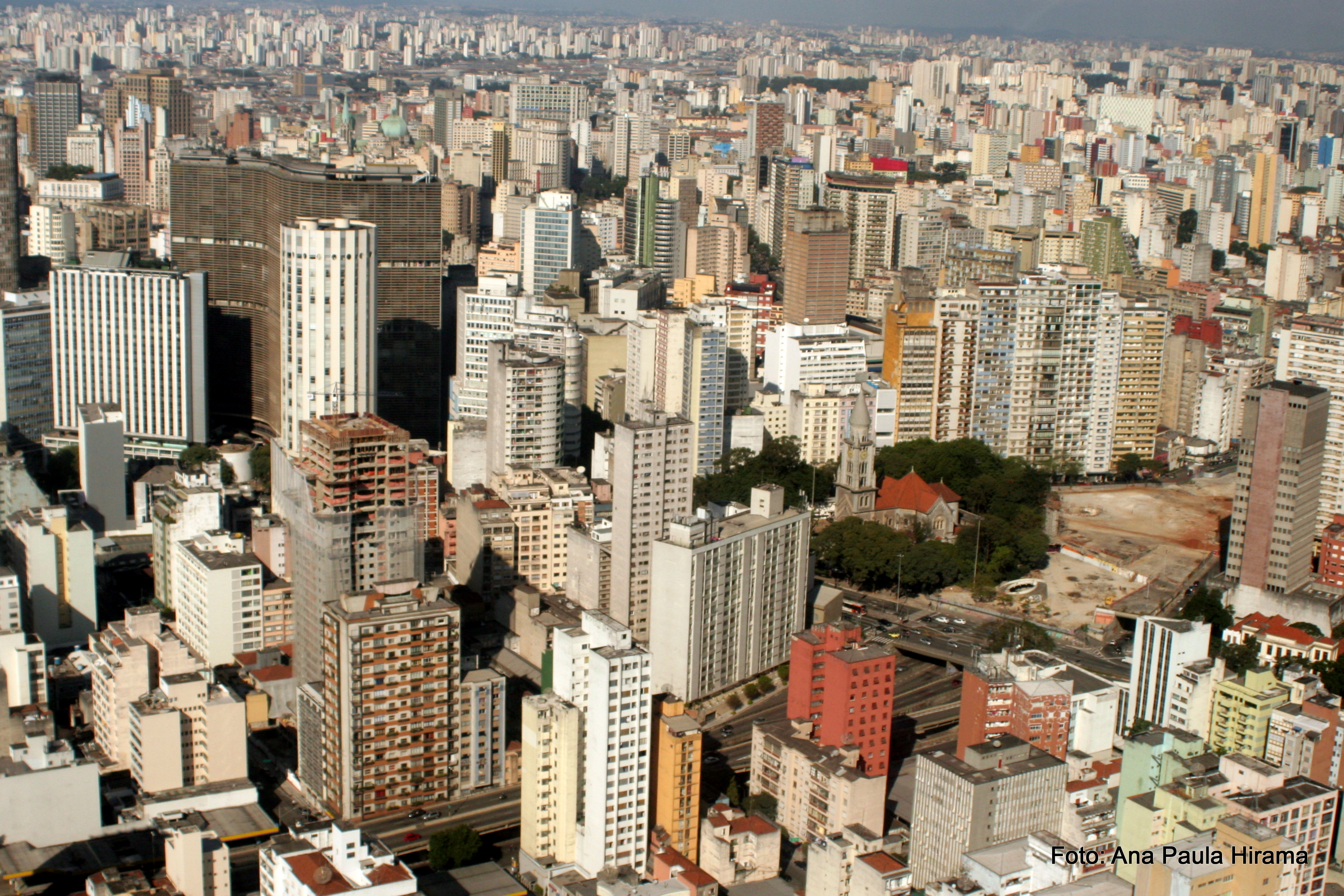 Sao Paulo, Brazil